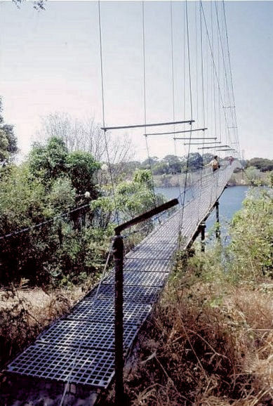 Sambesi-Suspensionbridge in Chinyingi Sambia